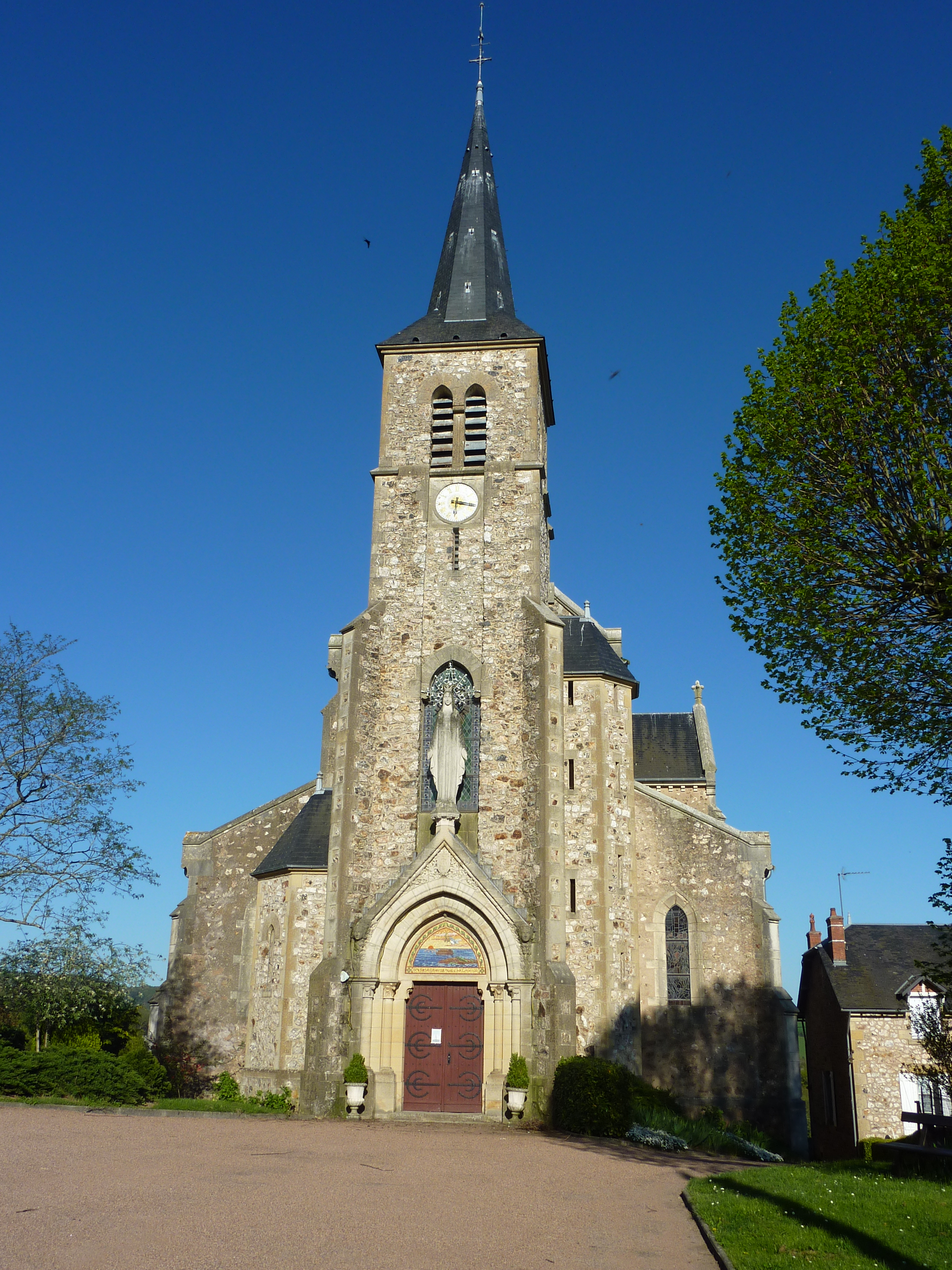 Chiddes (Nièvre) : la façade de l'église paroissiale